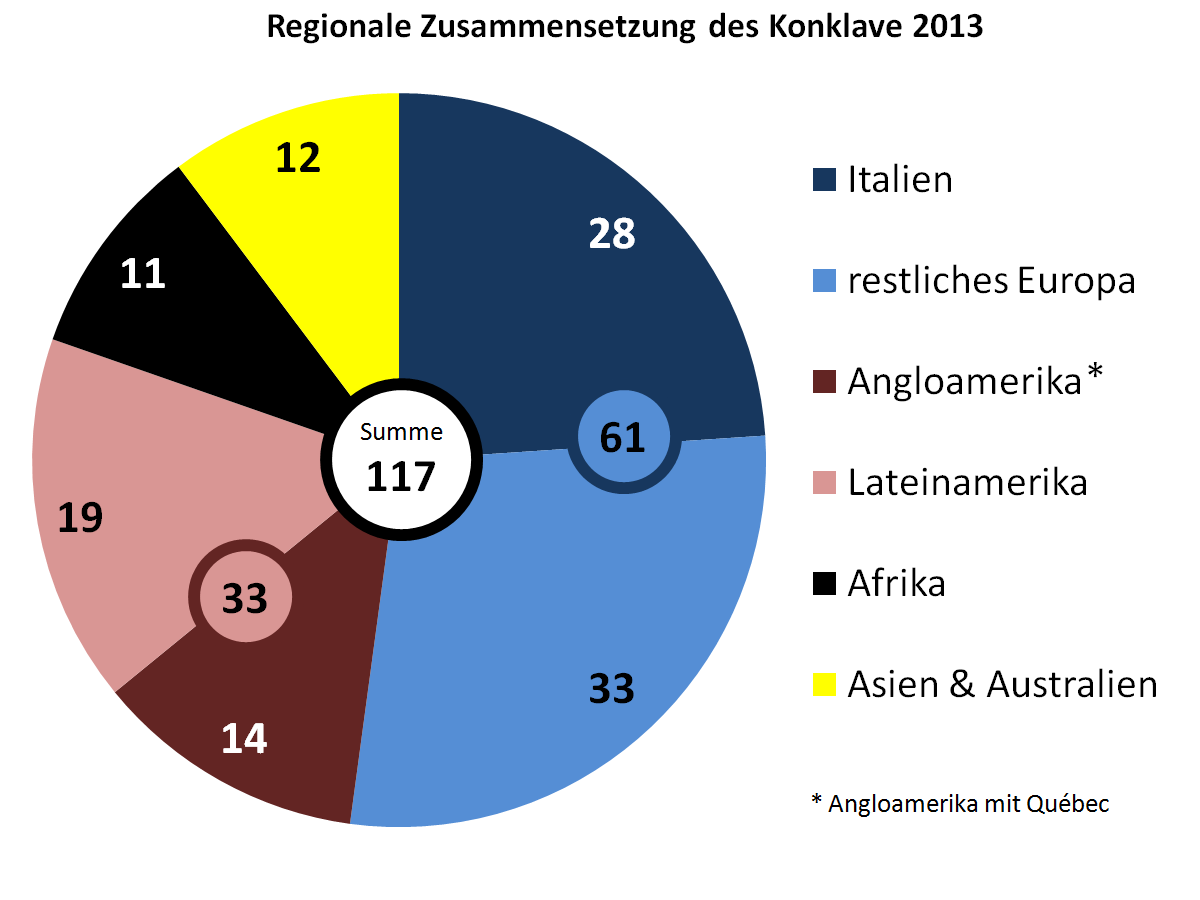 Die Regionale Zusammensetzung des Konklave 2013 nach Kontinenten mit grober kultureller Abgrenzung. Ozeanien als Teil Asiens definiert. Farbwahl der Kontinente der ursprünglichen Zuordnung der Farben der olympischen Ringe folgend, wobei für das Feld Asien & Australien, die Farbe des größeren Kontinents verwendet wurde.